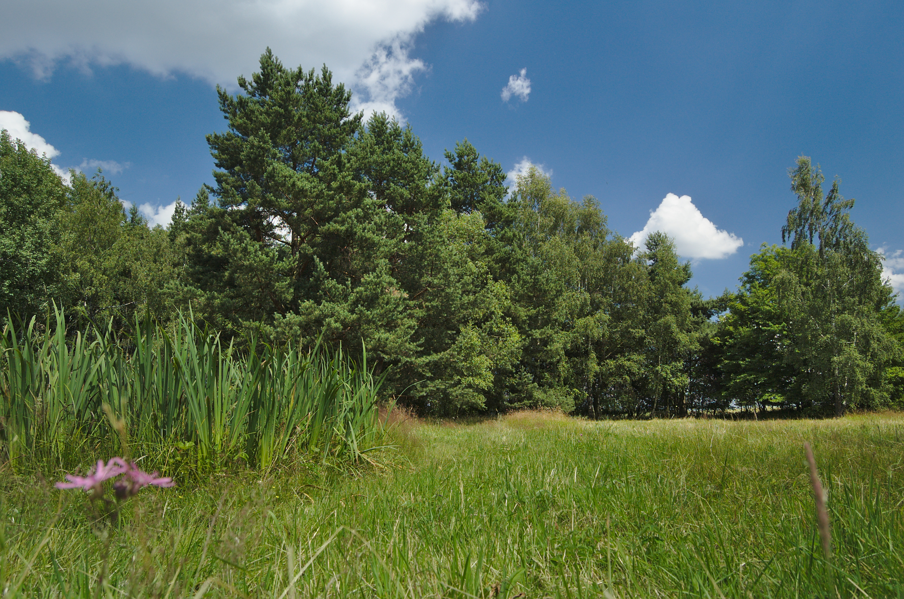 Skřípovský mokřad, okres Prostějov